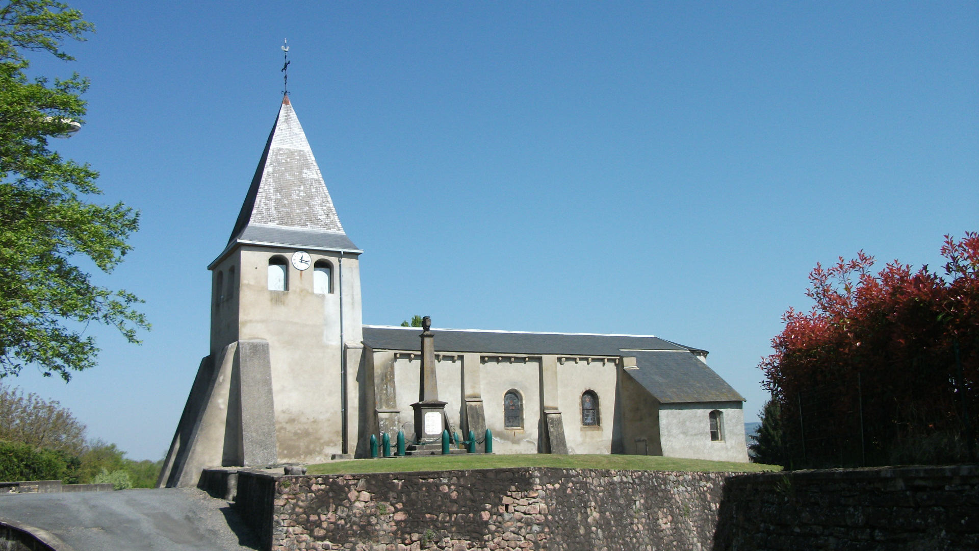 Église de Saint-Priest-Bramefant, Puy-de-Dôme, Auvergne, France